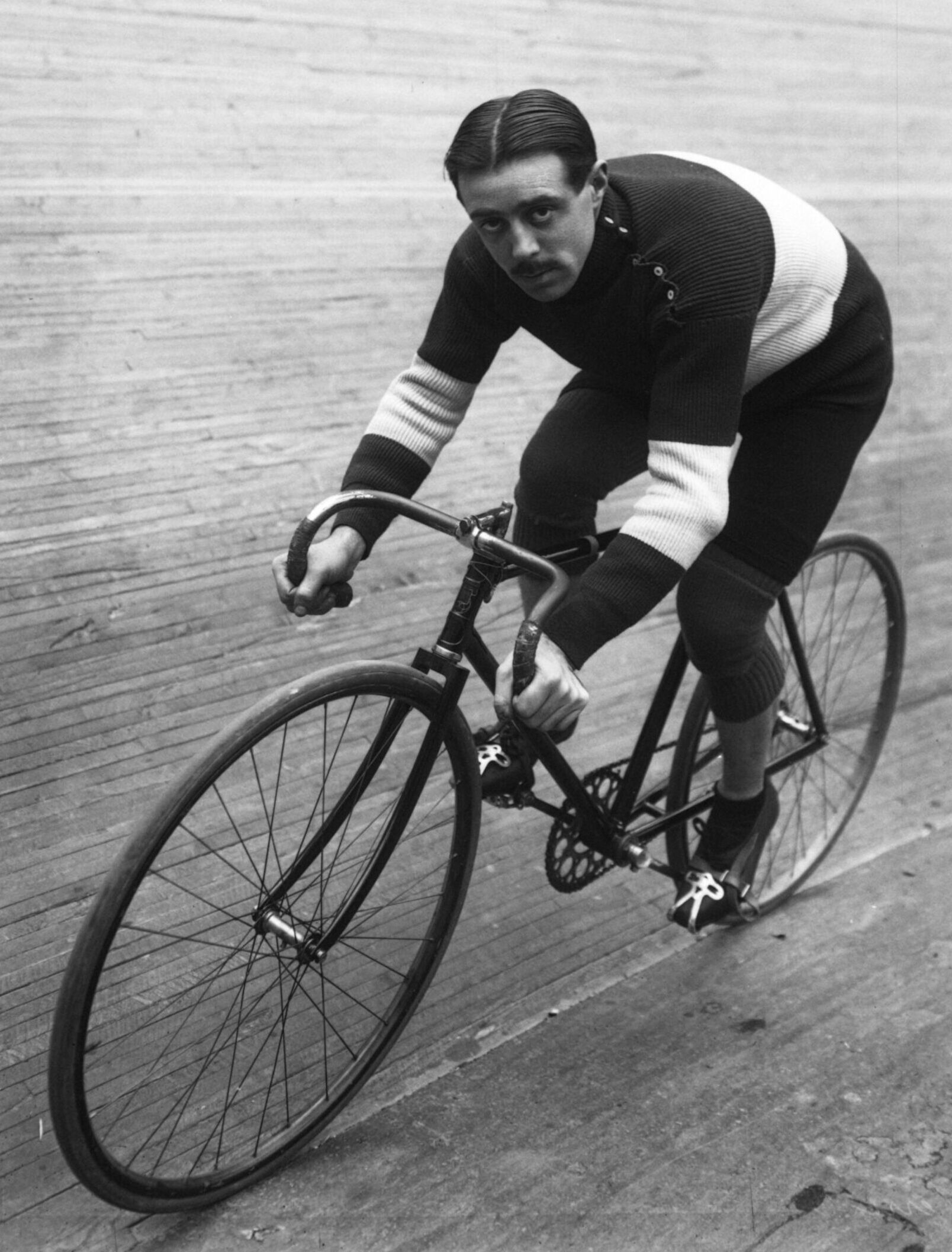 Francesco Verri portrait du coureur cycliste avant le départ